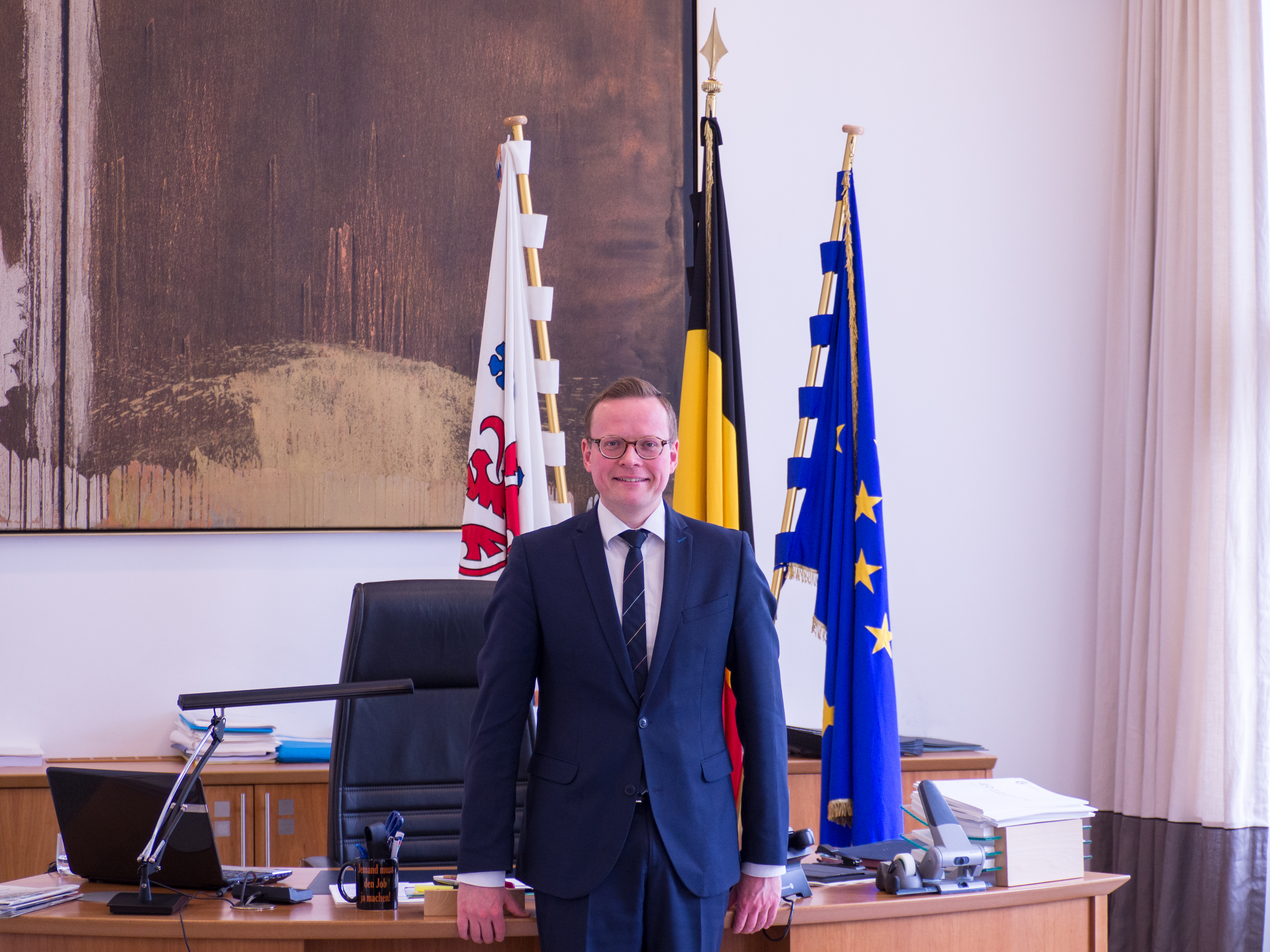 Der aktuelle Parlamentspräsident Alexander Miesen